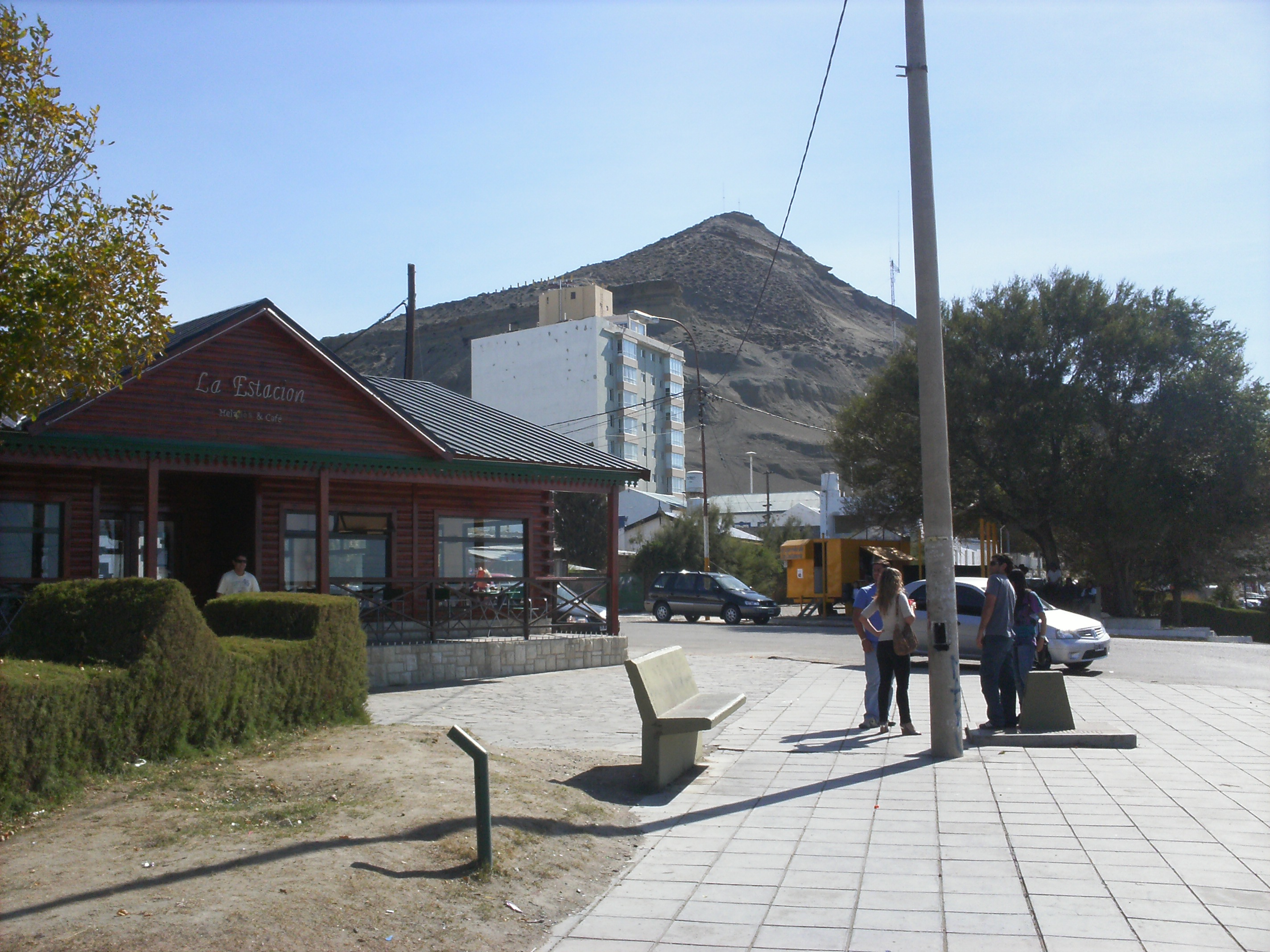 vista de la plaza mas famosa